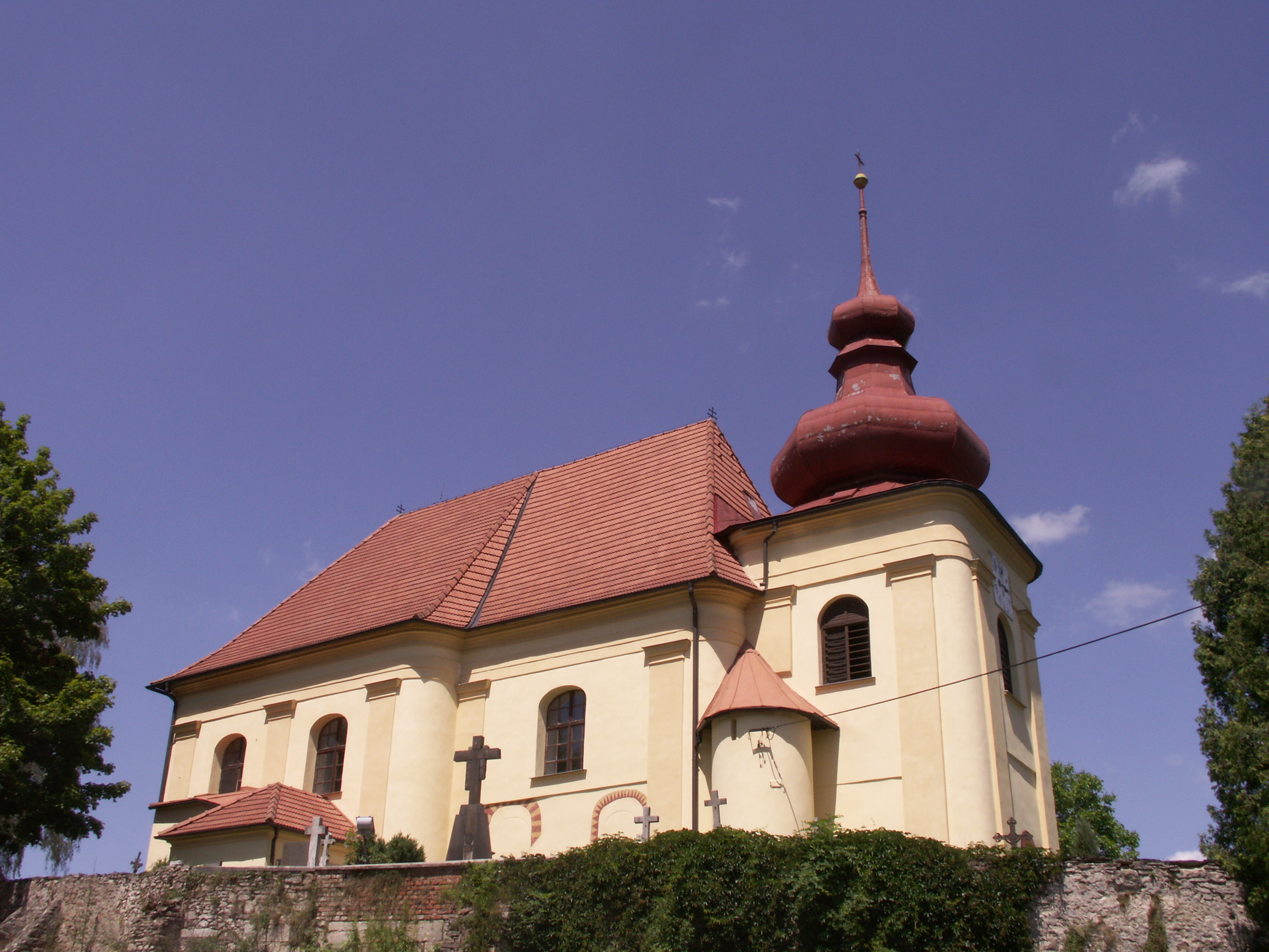 Kostel sv. Jakuba (Dalečín), Dalečín